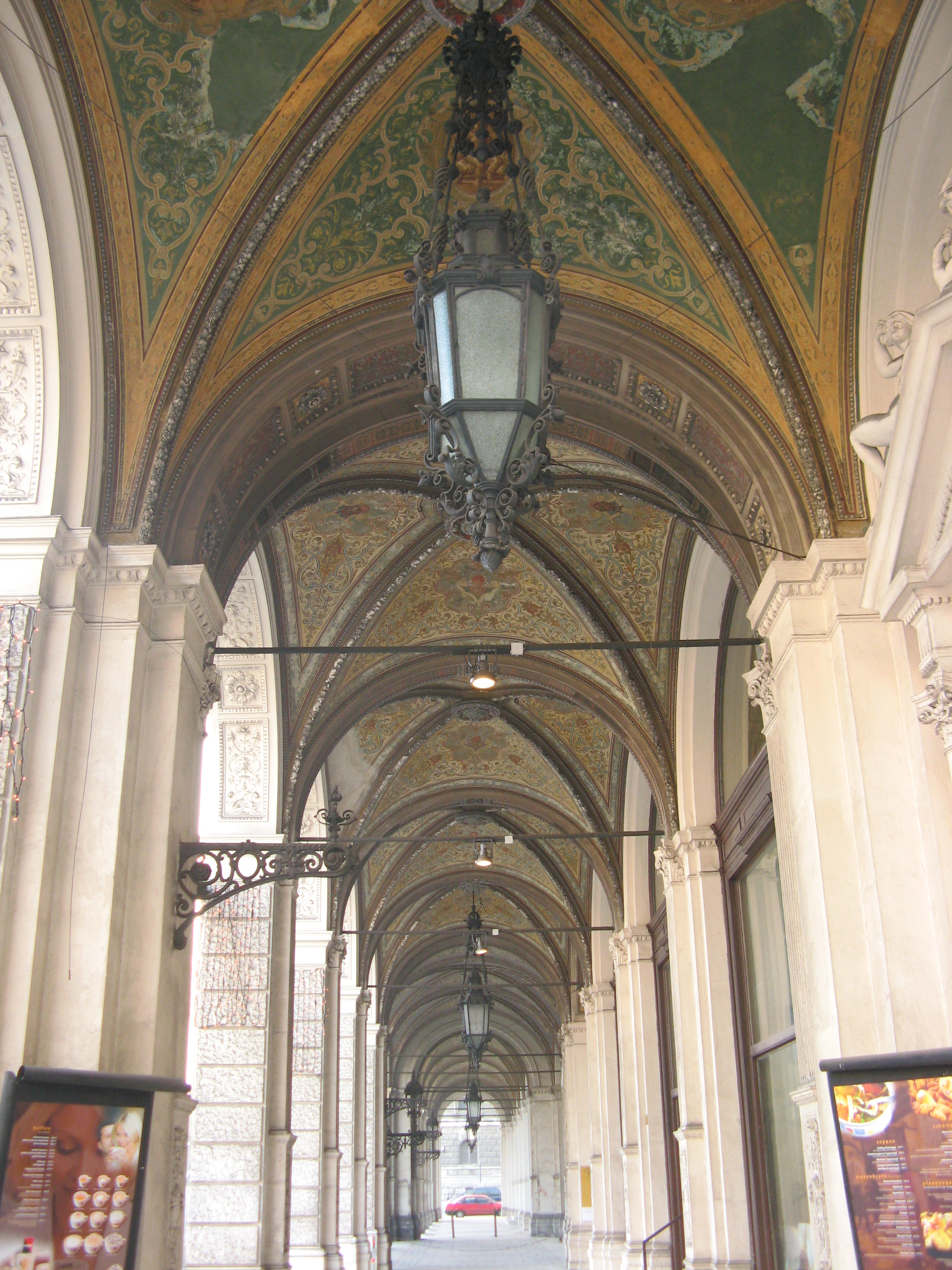 Arkaden (1880-83) von Franz von Neumann, Rathausplatz 4, Wien-Innere Stadt